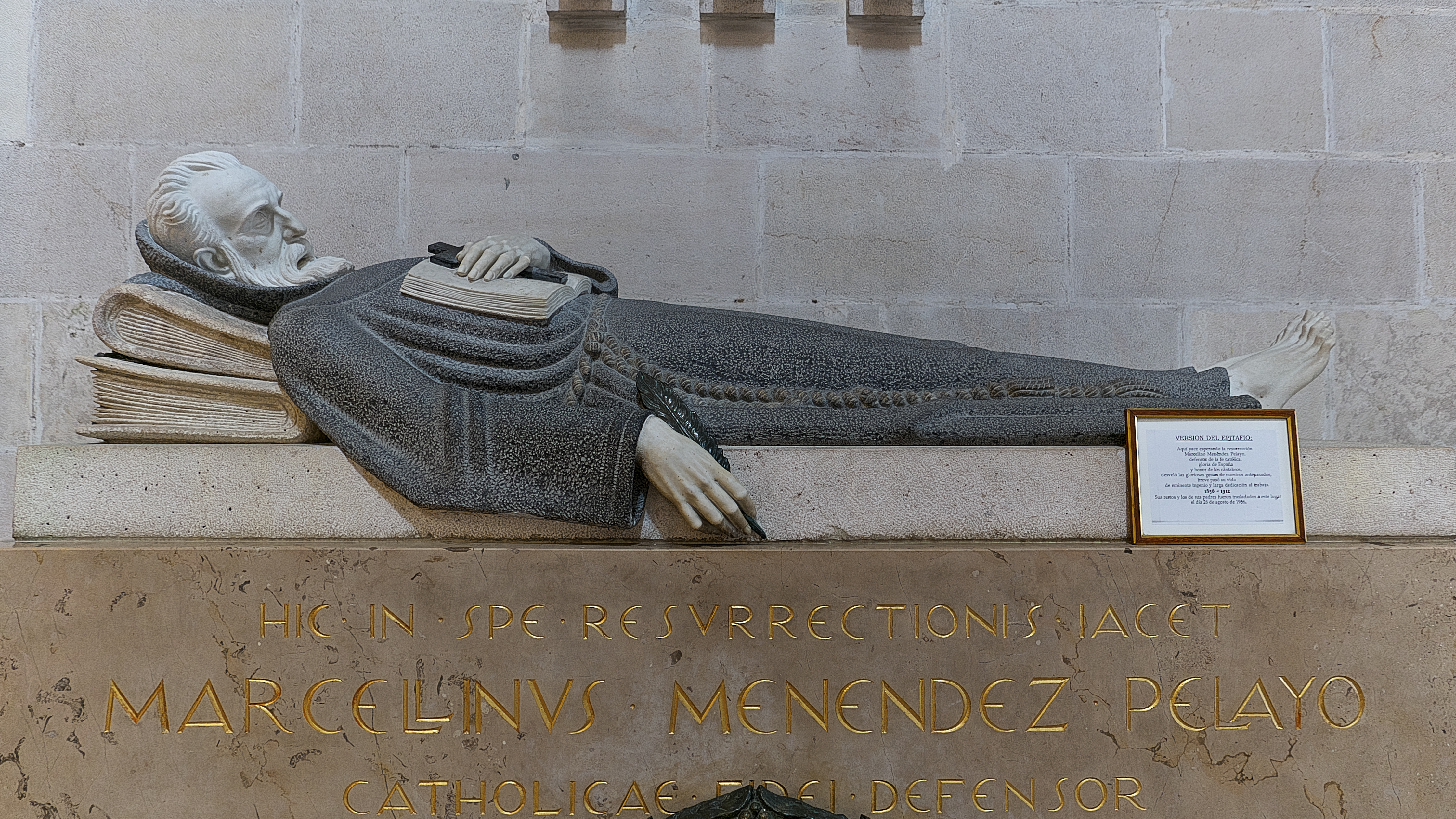 Catedral de Santander. Figura yacente de Marcelino Menéndez Pelayo tallada en piedra por Victorio Macho